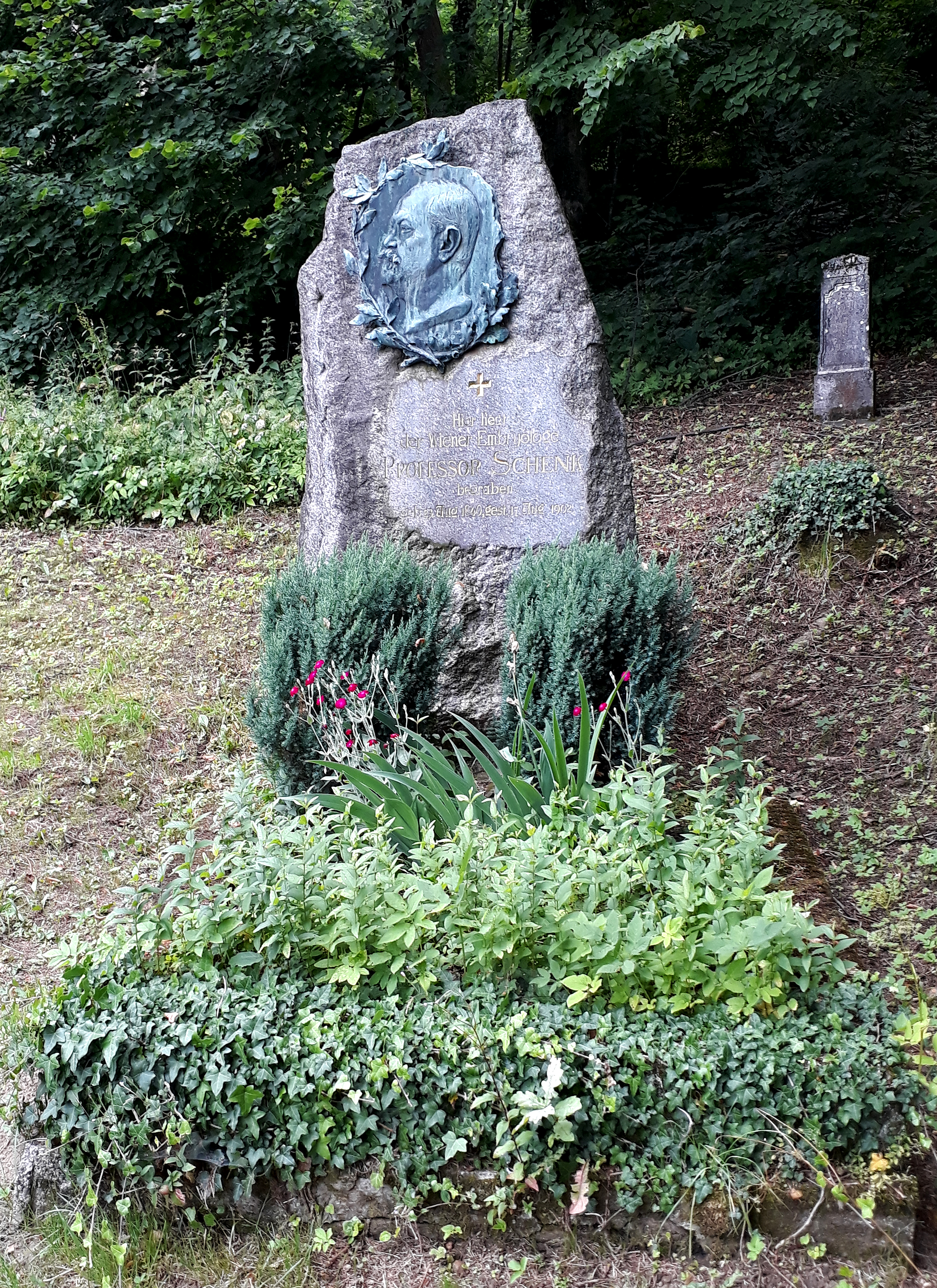 Grabmal des Embryologen in Bad Schwanberg, am aufgelassenen alten Friedhof oberhalb der Stadtpfarrkirche. Die Inschrift lautet: Hier liegt/der Wiener Embryologe/ Professor Schenk /begraben/geb.23. Aug.1840 gest.17. Aug. 1902